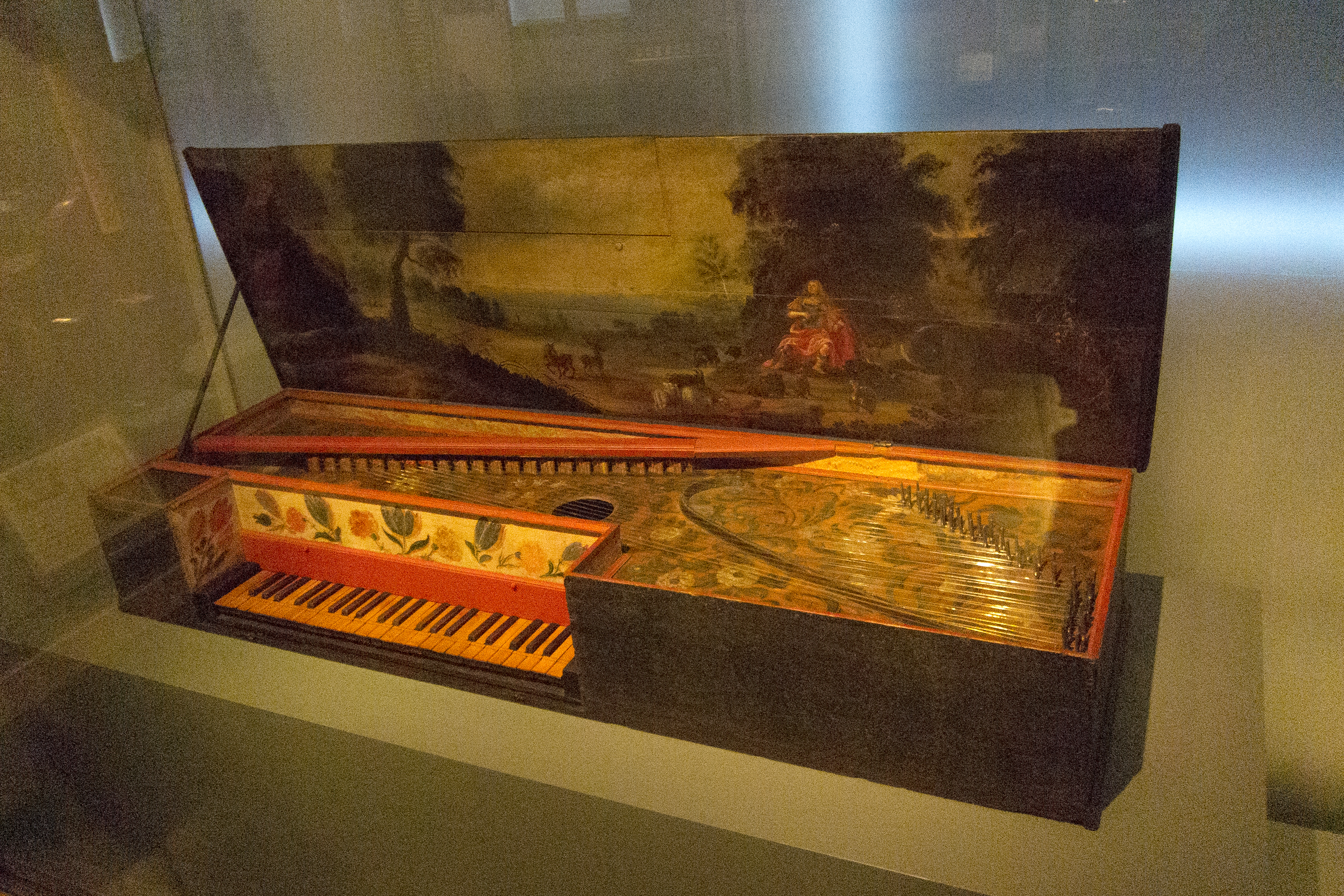 Virginal, deutsch, 17th century, Inv.-Nr.49, MfM.Uni-Leipzig “Painted harpsichord, Leipzig 2012” References ULEI:M0000049 Virginal, deutsch, 2nd half of 17th century, Inv.-Nr.49. Musical Instrument Museums Online (MIMO). Hubert Henkel: Kielinstrumente. Musikinstrumenten-Museum der Karl-Marx-Universität Leipzig. Katalog, Bd. 2, Leipzig 1979, S. 30-32.